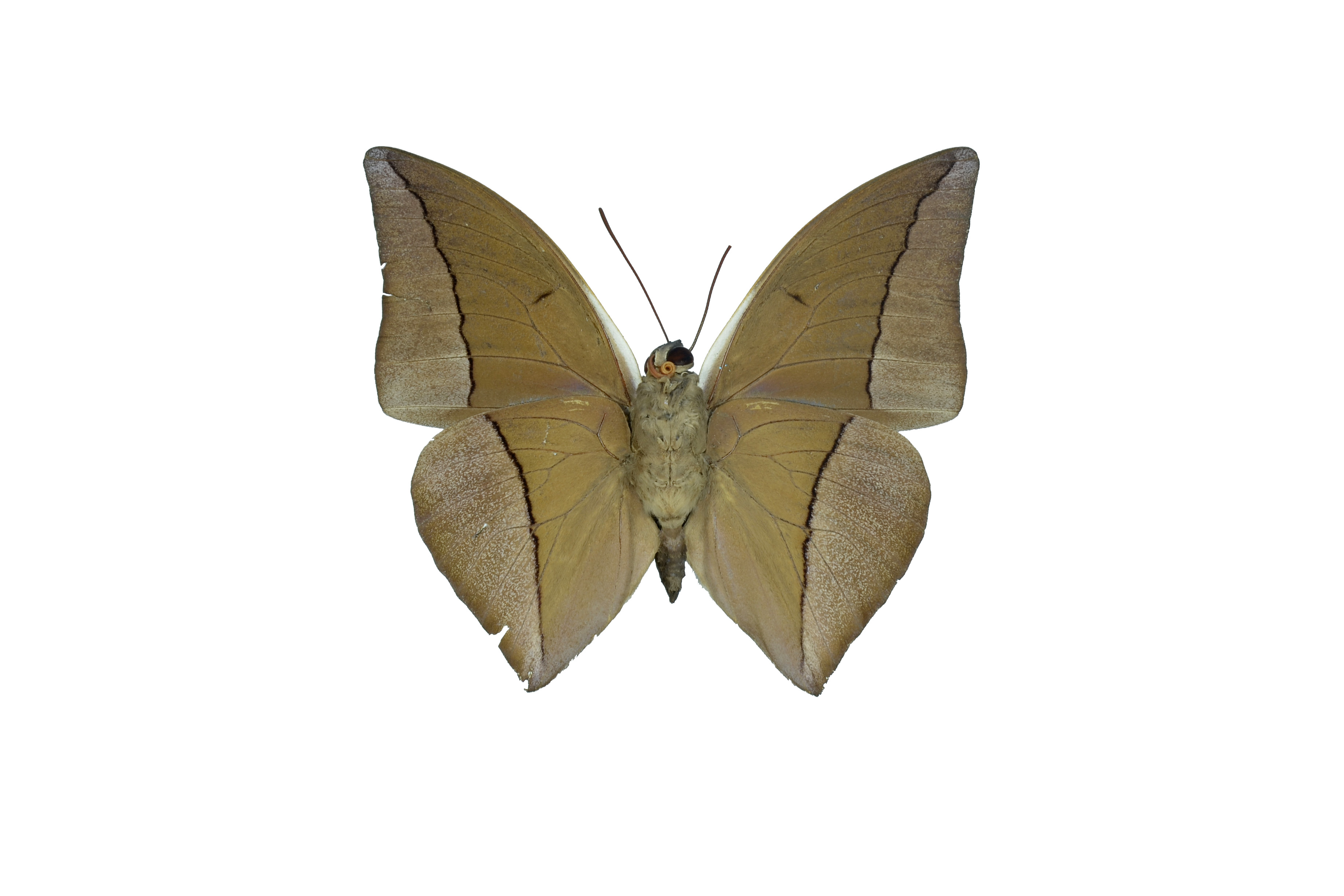 eastern Ecuador